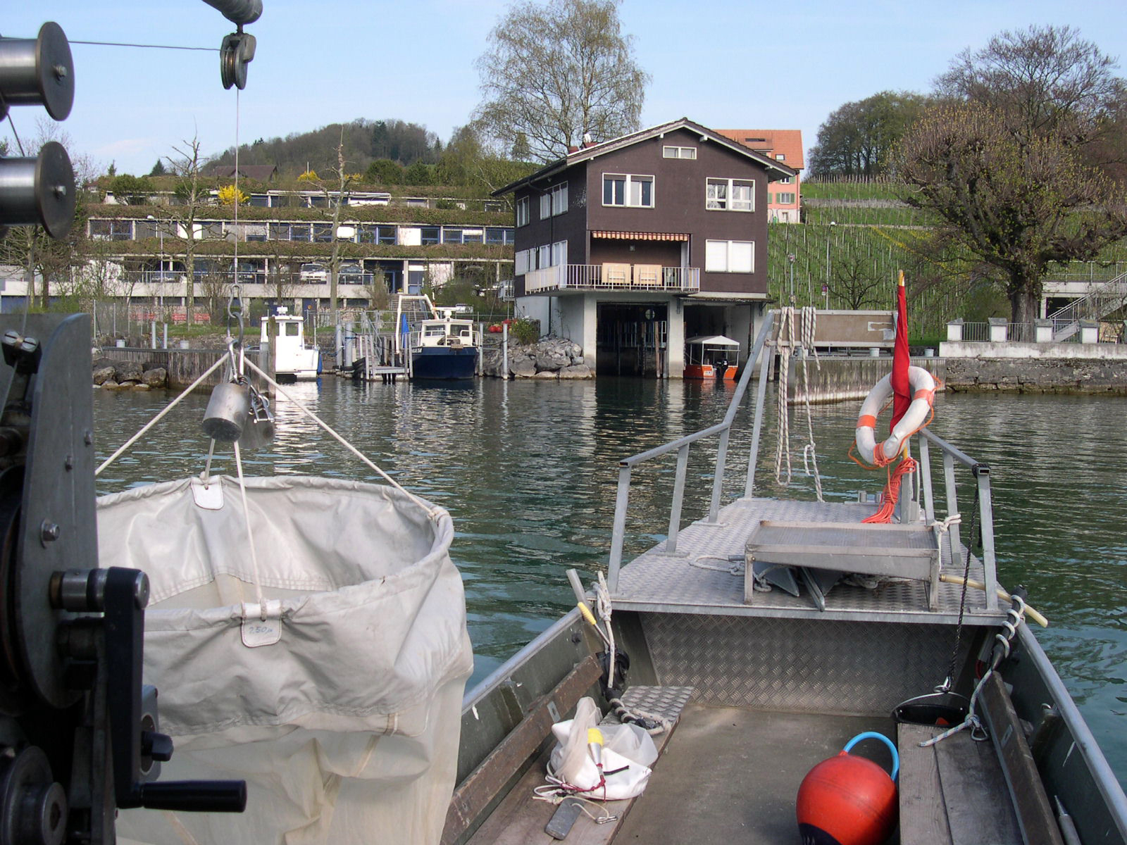 Die Gebäude der Eawag in Kastanienbaum bei Luzern